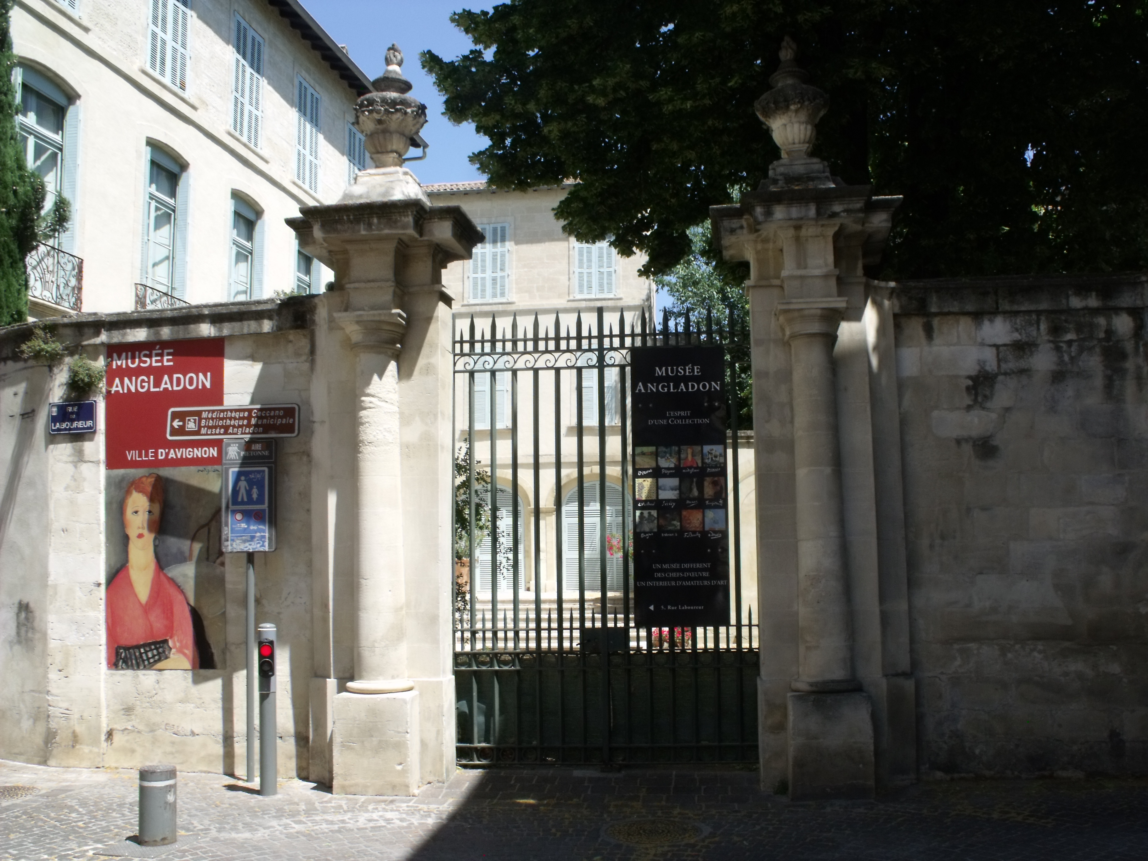 Entrée du musée Angladon